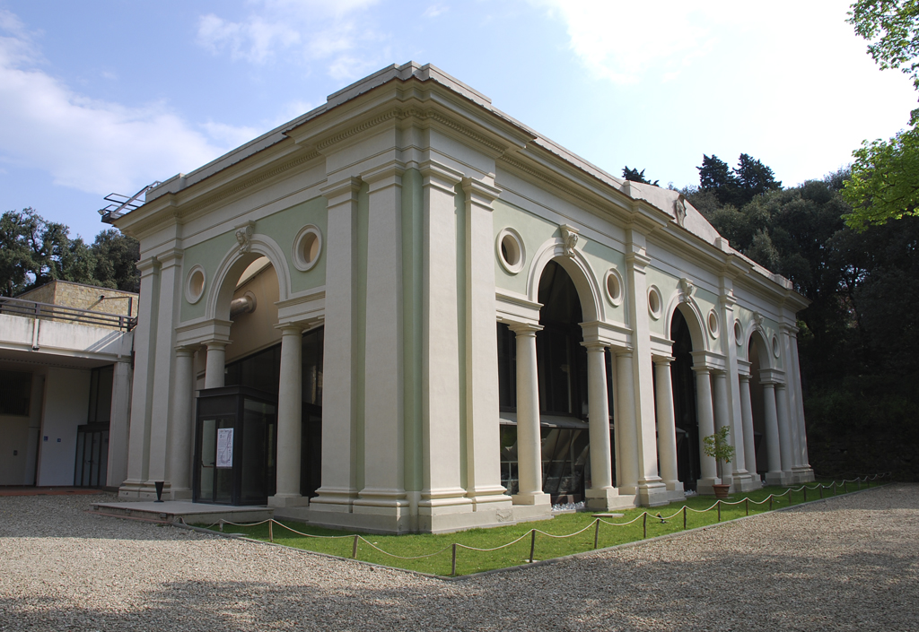 Il Boschetto or Villa Strozzi Park, Florence, Italy. Villa Strozzi Lemon-House (Wintergarten). Overview.